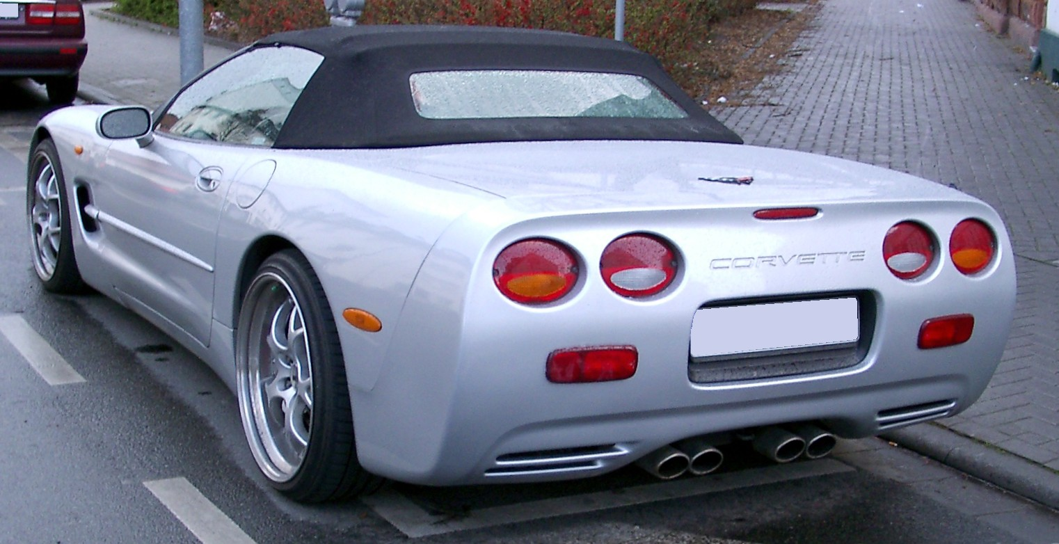 Corvette C5